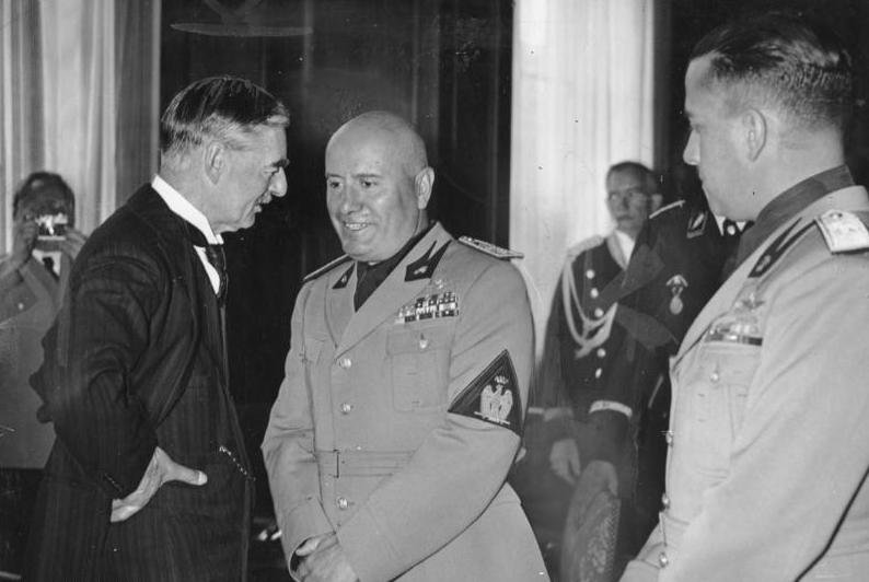 Münchener Abkommen, Chamberlain, Mussolini, Ciano ADN-ZB/Archiv Zum Viermächteabkommen in München am 29.9.1938. UBz: Die Begegnung zwischen dem britischen Ministerpräsidenten Neville Chamberlain und Benito Mussolini am Tage der Unterzeichnung des Abkommens im Führerbau am Königlichen Platz in München. Rechts der italienische Aussenminister Graf Galeazzo Ciano. 12877-38 [Scherl Bilderdienst] Abgebildete Personen: Chamberlain, Neville Arthur: Premierminister, Großbritannien Ciano, Galeazzo Graf: Außenminister, Italien (GND 119178362) Mussolini, Benito: Ministerpräsident, Regierungschef, Chef des Faschistischen Großrates, Italien